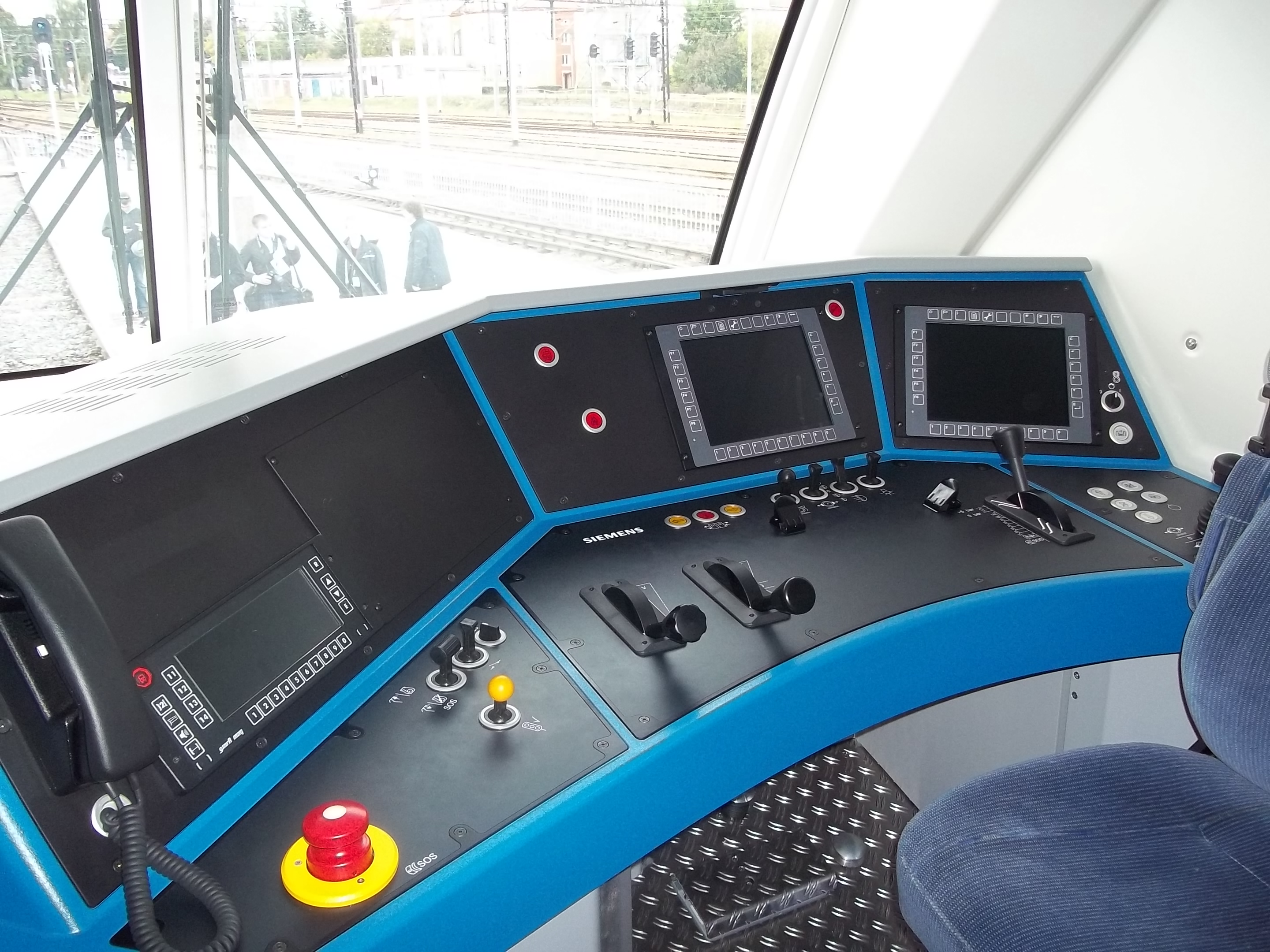 Wnętrze kabiny maszynisty lokomotywy elektrycznej Vectron w malowaniu przewoźnika DB Cargo Polska na Międzynarodowych Targach Kolejowych Trako 2013 w Gdańsku.